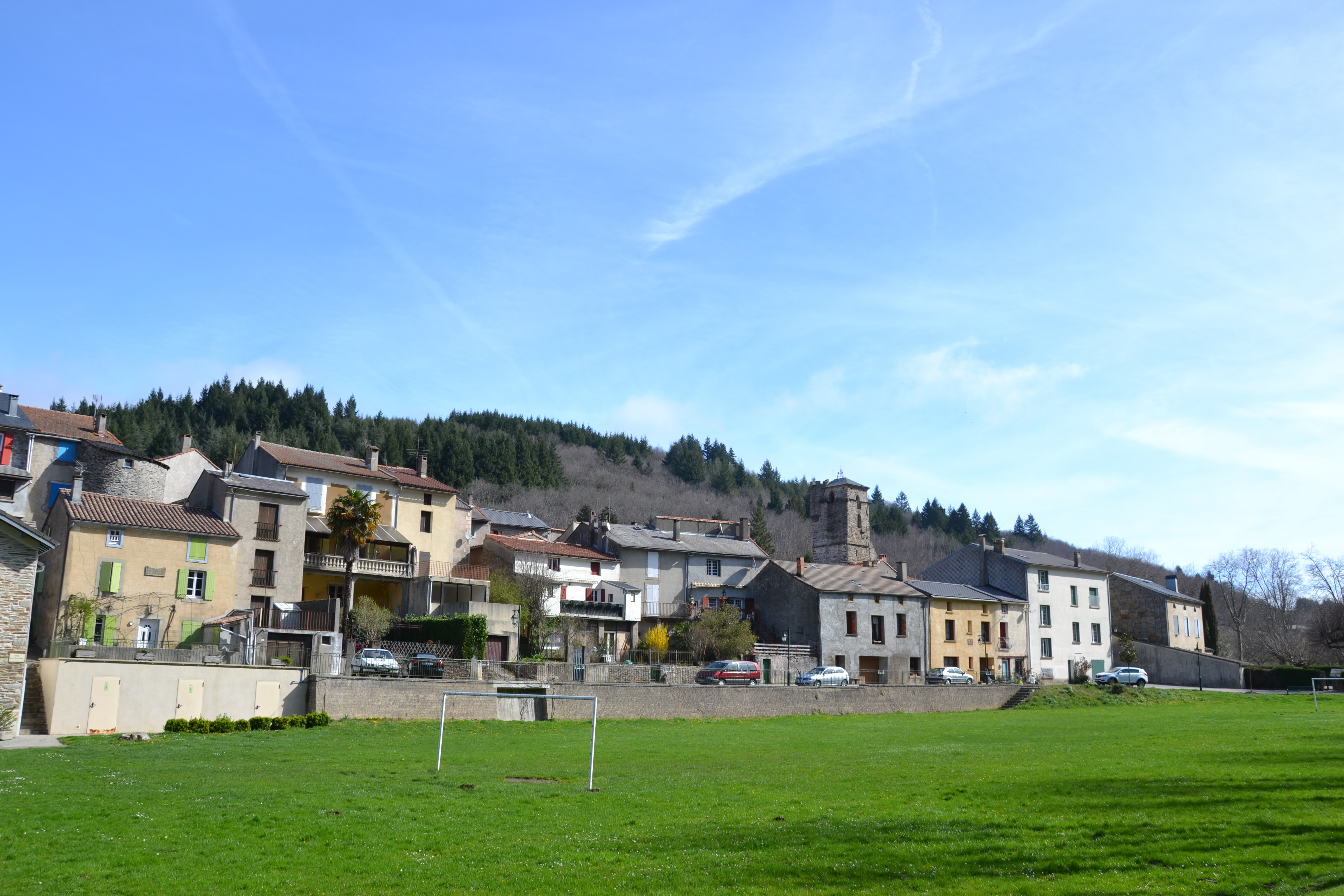 Vue générale de Cuxac-Cabardès